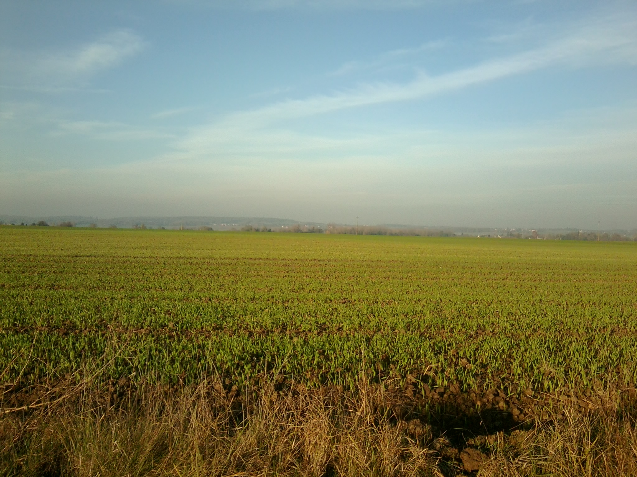 Galluis (78) : La plaine de Montfort-l'Amaury.